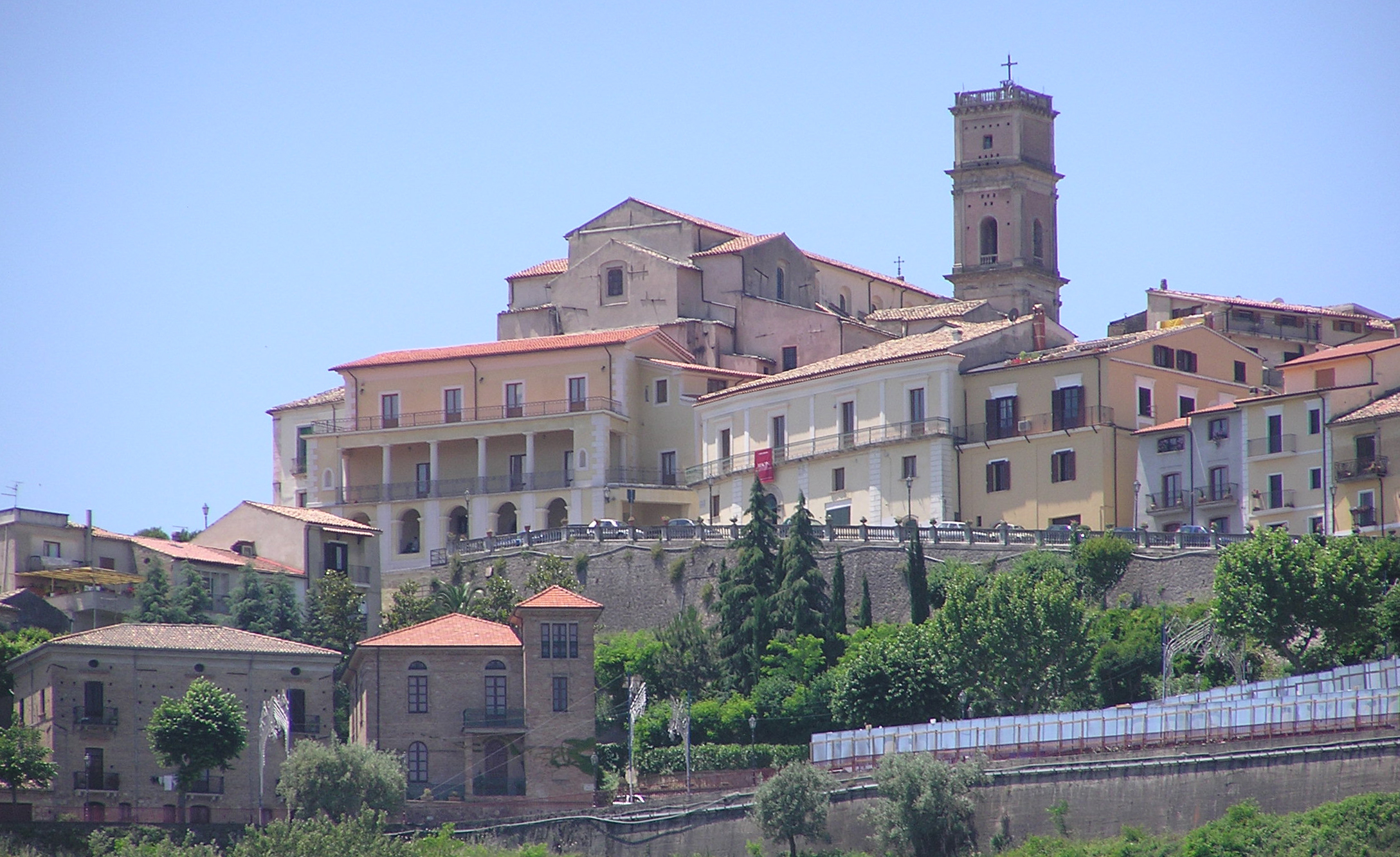 Il museo ed il Centro Capizzano (Foto di Luigino C.)